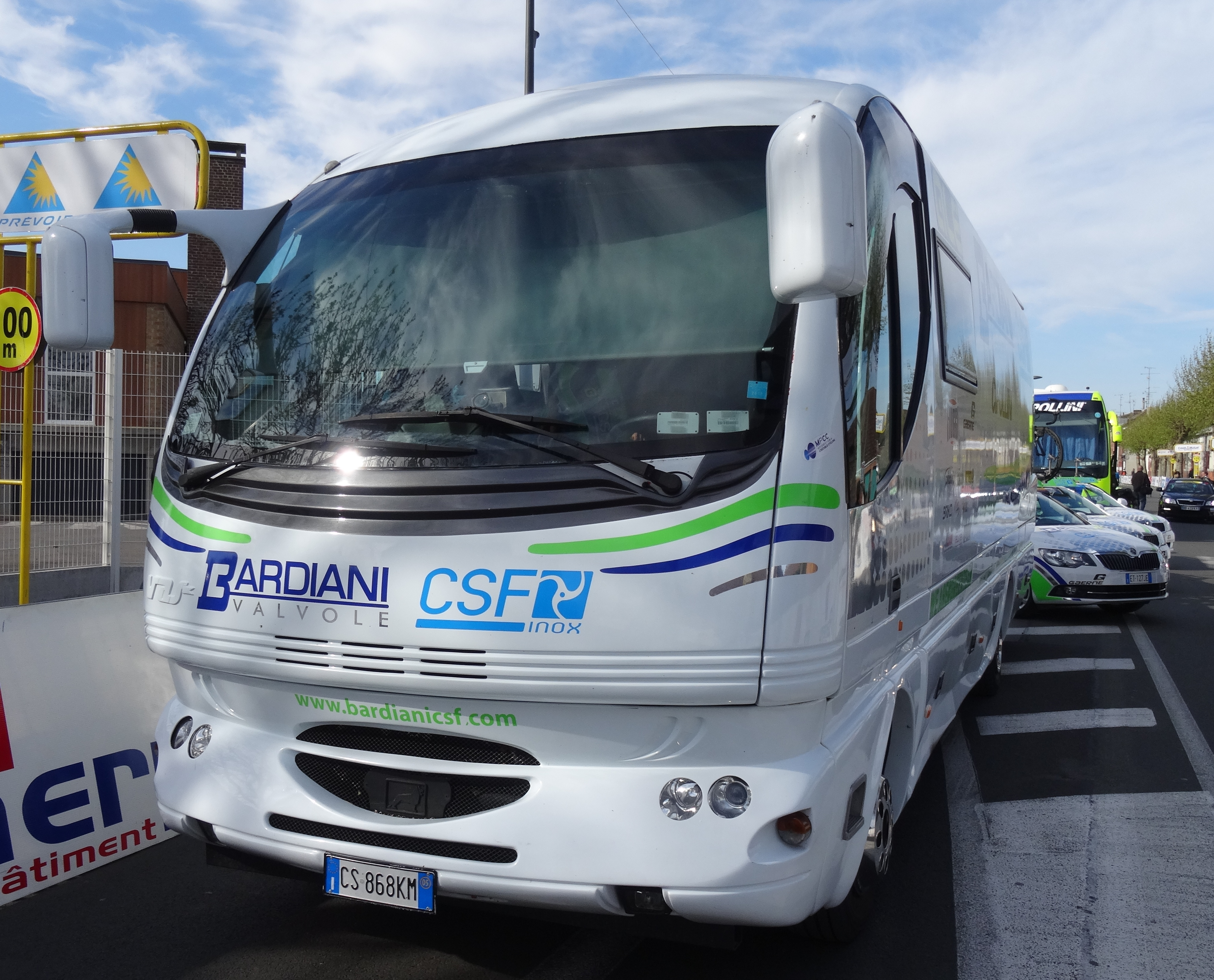 Reportage réalisé le jeudi 17 avril à l'occasion du départ et de l'arrivée du Grand Prix de Denain 2014 à Denain, Nord, Nord-Pas-de-Calais, France.